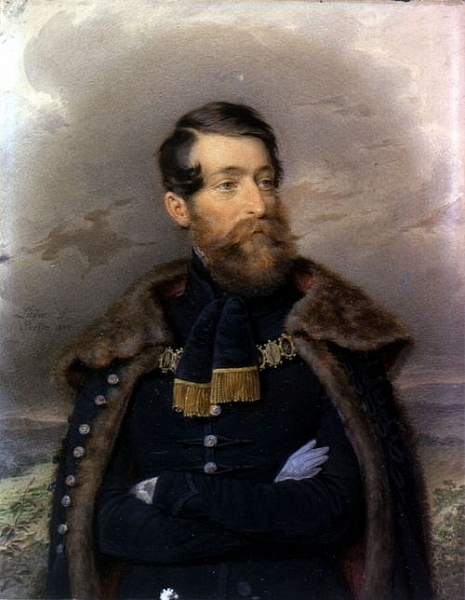 Friedrich Lieder: Rottenbiller Lipót képmása, 1844. Mosonmagyaróvár, Hansági Múzeum, Gyurkovich-gyűjtemény